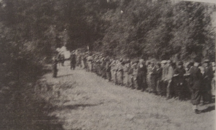 Fotografia wykonana w trakcie działań OP-23 na terenie powiatu sanockiego (Polska) w lipcu lub sierpniu 1944. Przedstawia zbiórkę wszystkich plutonów na leśnej polanie. Zdjęcie opublikowane przed 1994 rokiem ("Kryptonim San" 1992).